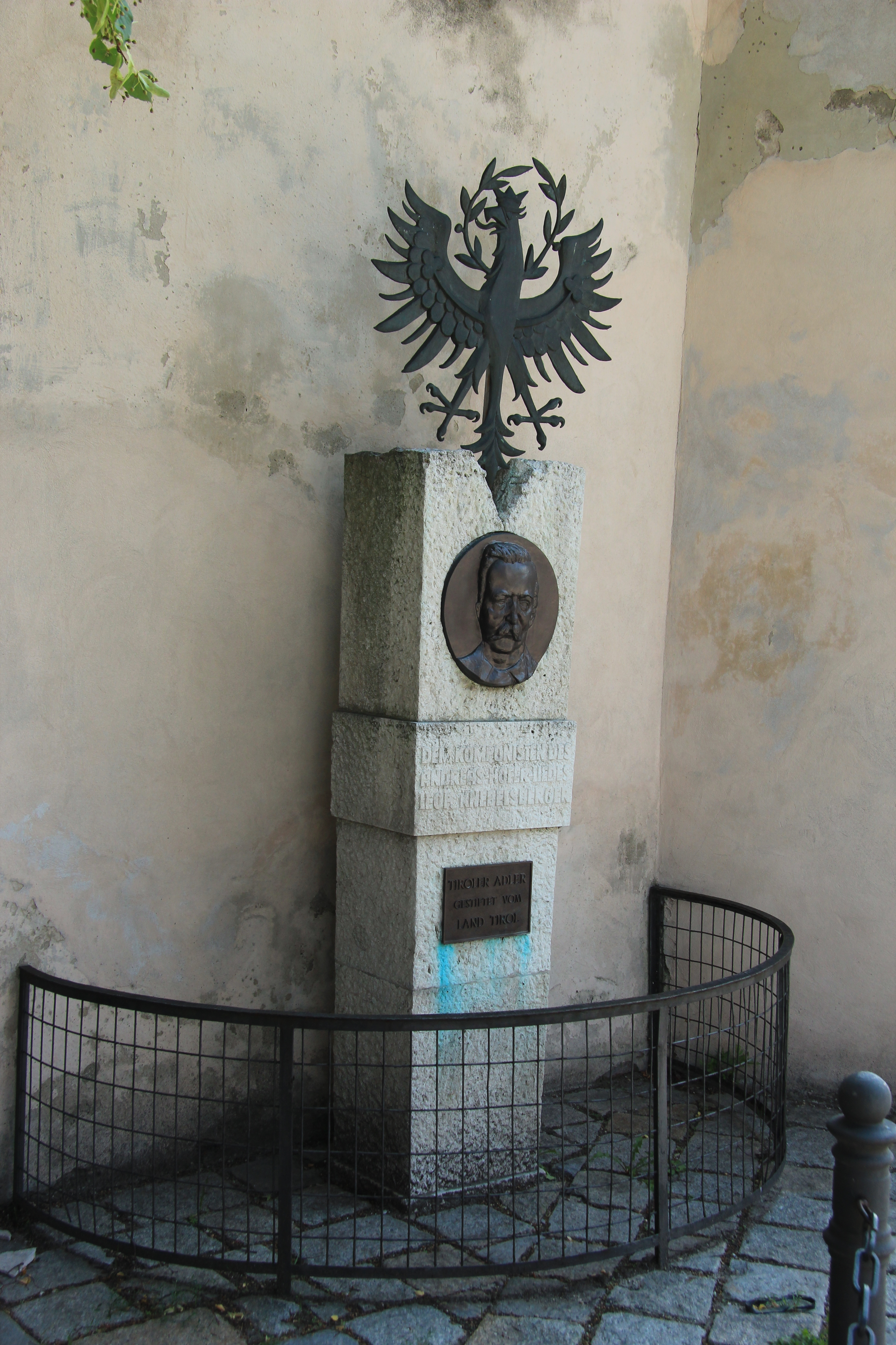 Gedenkstein an den Komponisten Leopold Knebelsberger an der Martinskirche in Klosterneuburg